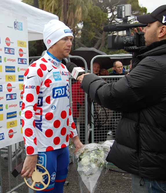 Rémi Pauriol im Trikot des besten Bergfahrers bei Paris-Nizza 2011